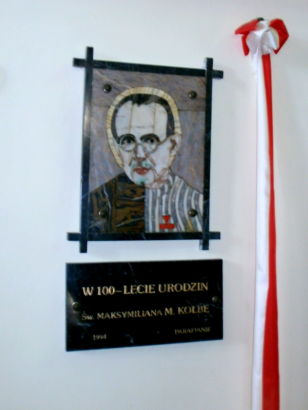 Wojcieszów, kościół parafialny pw. Najświętszej Maryi Panny Królowej Polski